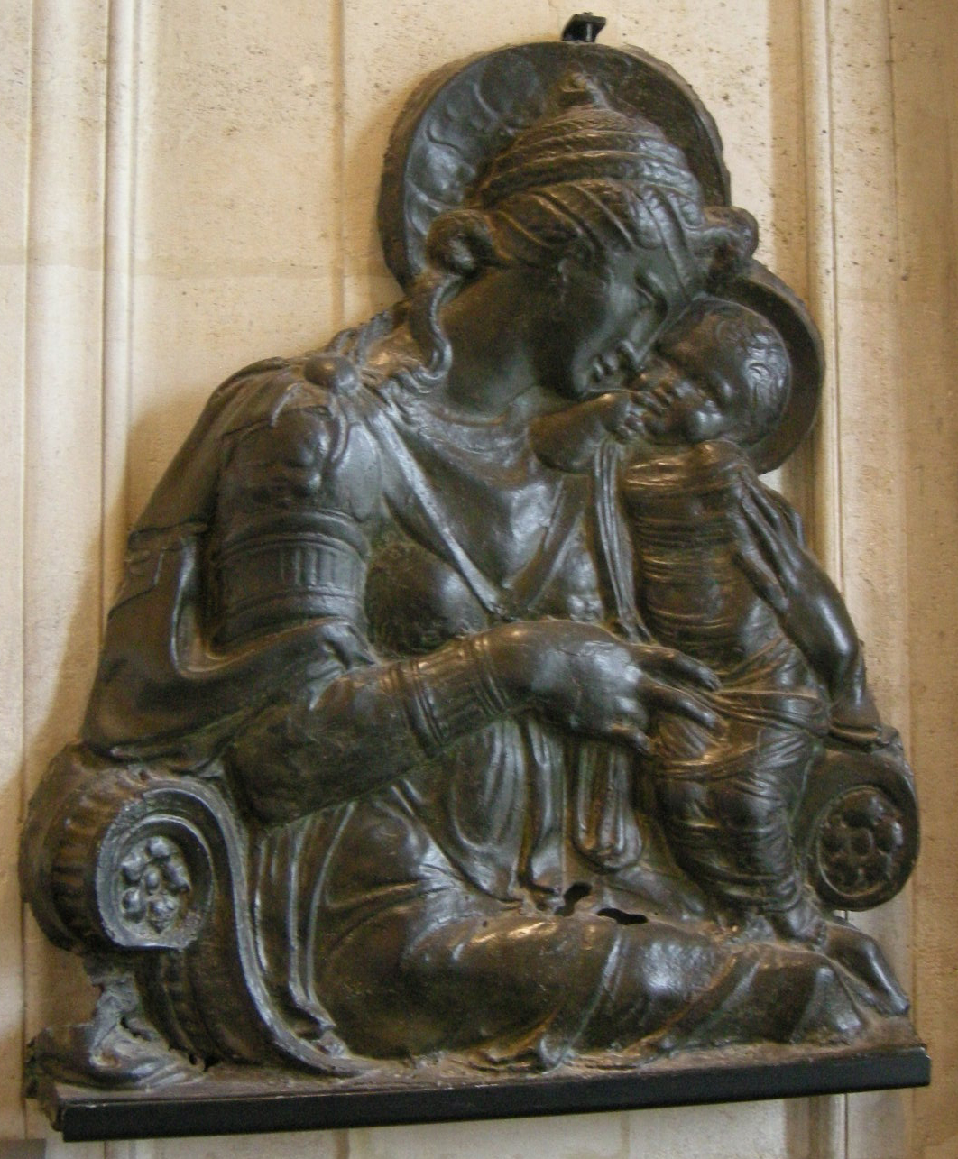 Gianfrancesco rustici (attr.), madonna col bambino.JPG